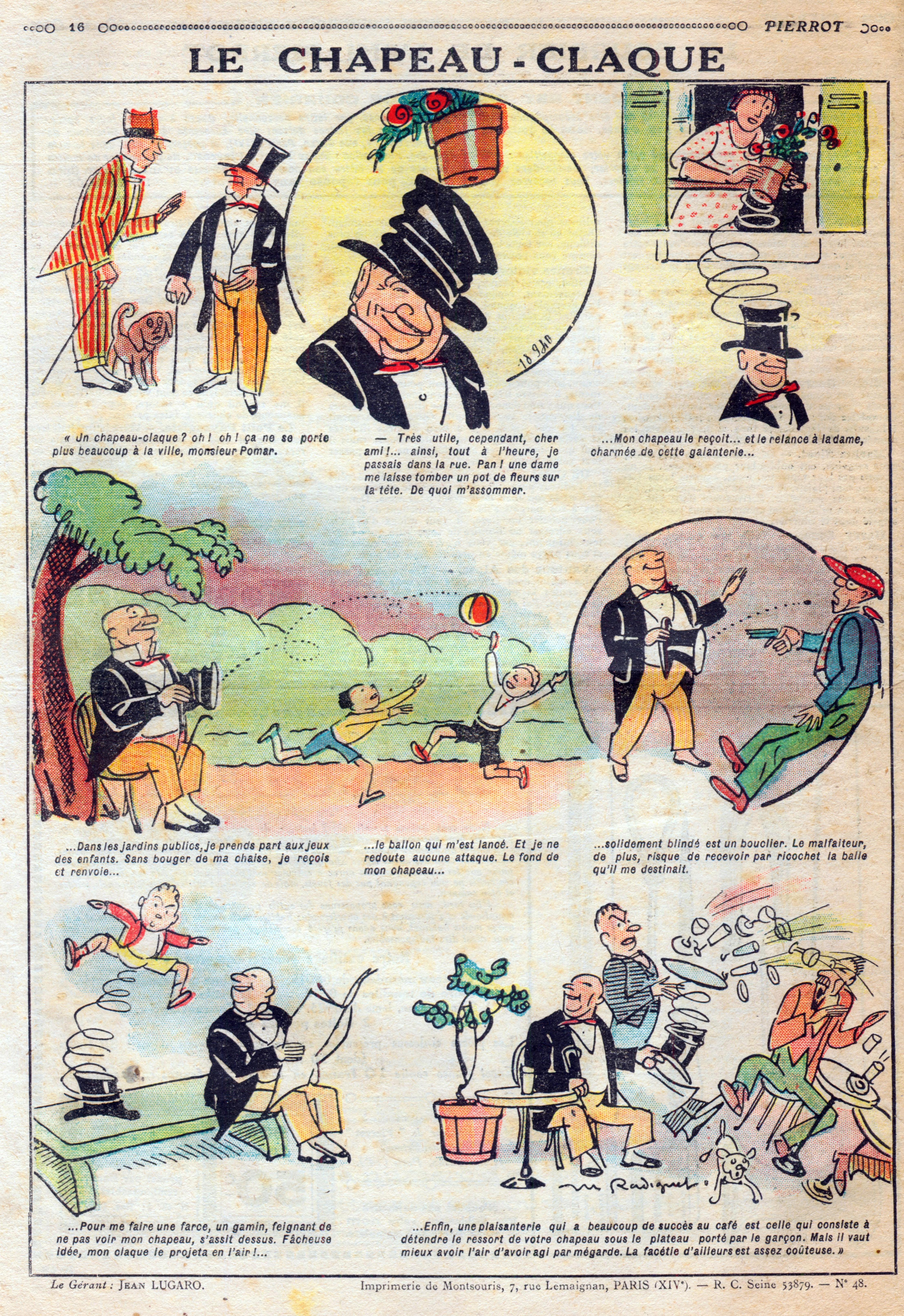 Maurice Radiguet (1866-1941). « Le chapeau-claque » Couverture arrière de « Pierrot : journal des garçons » n° 48 (première année) du 21 novembre 1926